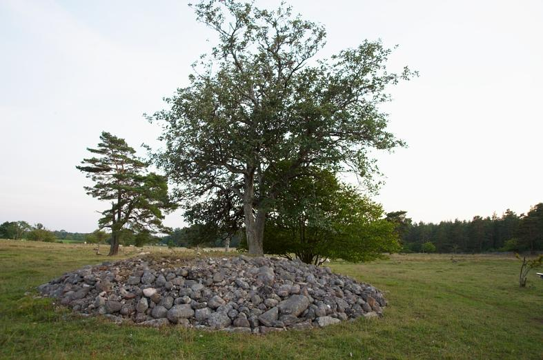 Fröjel 31:3 (1). Järnåldersboplats från ca 200 f.Kr - 550 e.Kr. Motiv: Fröjel 31:3 (1) Nyckelord: Riksintressen Kategori: Husgrund, förhistorisk/medeltida Fröjel 31:3 (1). Järnåldersboplats från ca 200 f.Kr - 550 e.Kr. Fröjel 31:3 (1).